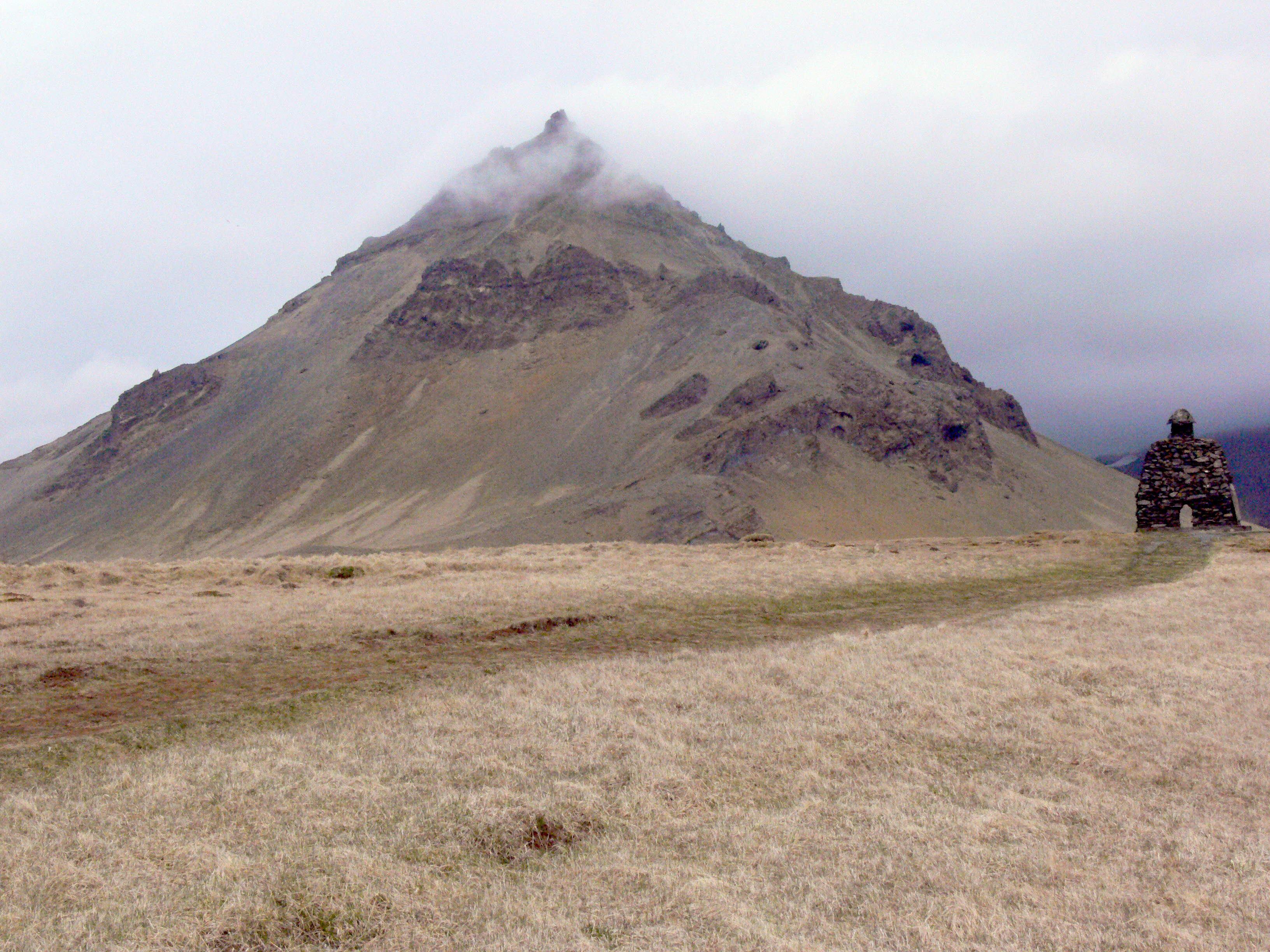 Arnastapi: Stapafell, ganz rechts Barður Snæfellsás